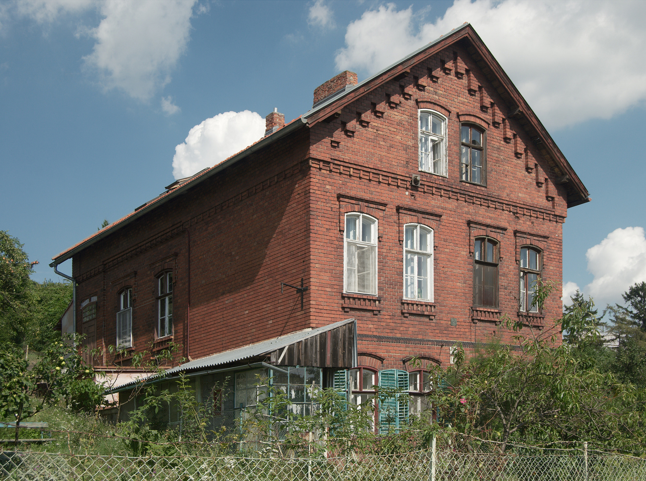 Židenice - typický dům Wannieckovy kolonie. Na fotografii je zachycen dvojdomek Viniční 187/187a